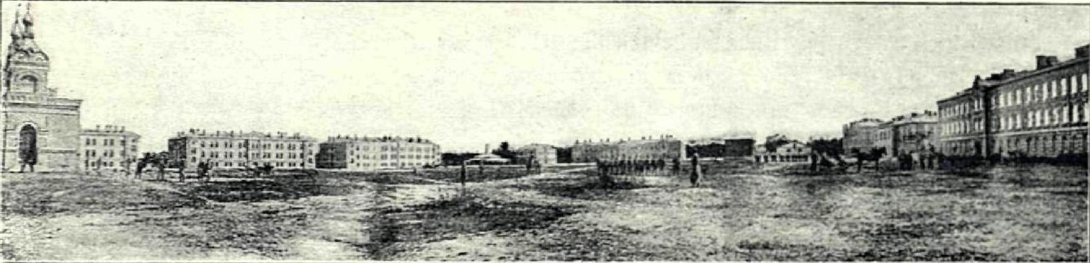 Агульны выгляд 16-га драгунскага глухаўскага палка ў Астралэнцы